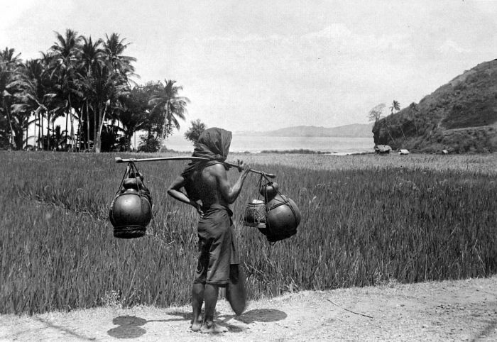 Repronegatief. Een verkoper van palmwijn (tuak) op Bali